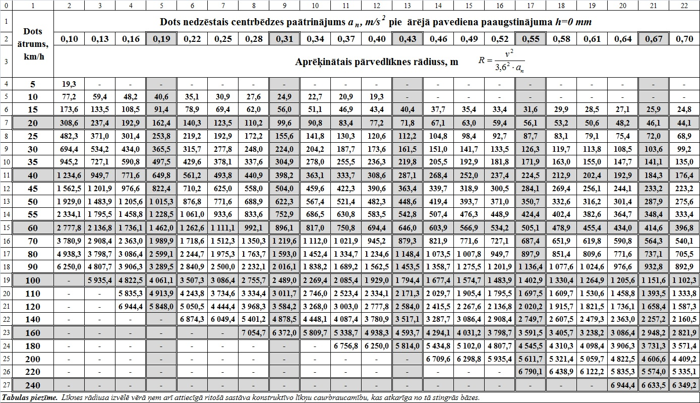 Pārmiju pārvedas pārvedlīknes rādiusa lielums, pie dota ātruma un nedzēstā centrbēdzes paātrinājuma, kad ārējā sliežu pavediena paaugstinājums līknē ir 0 mm